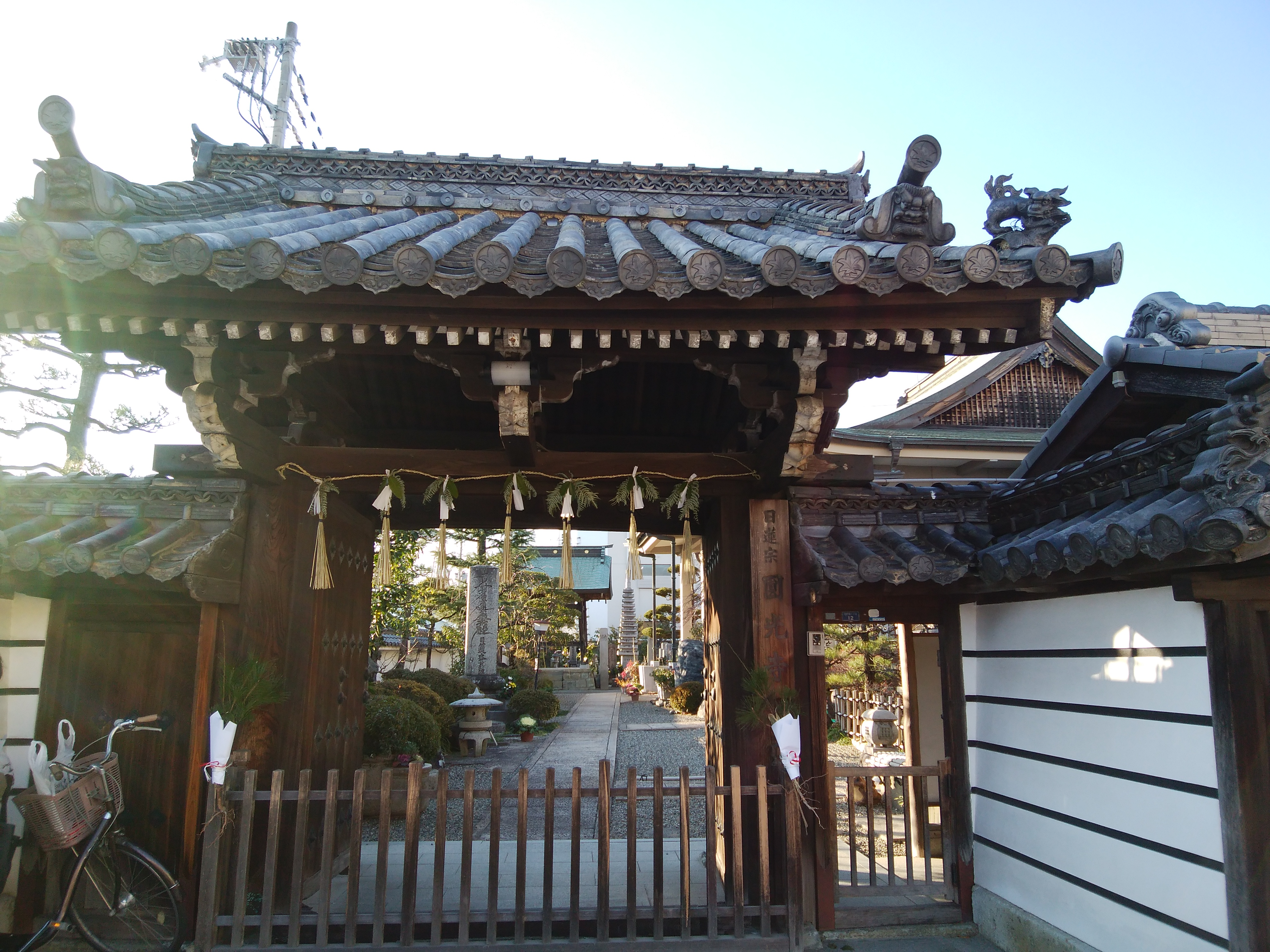 長明山圓光寺（えんこうじ）